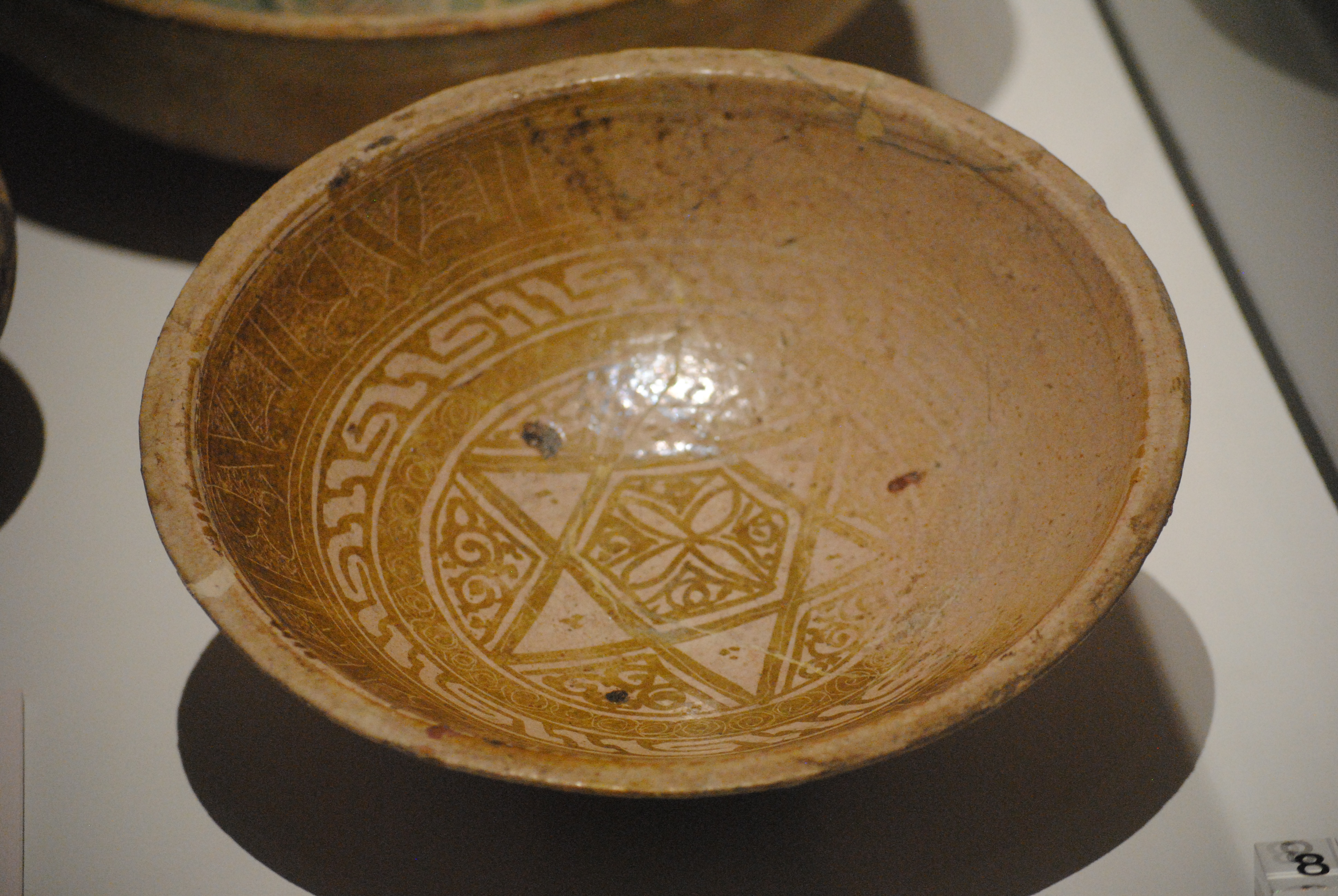 Scodella in maiolica decorata a lustro metallico e usata come bacino ceramico - importata da Murcia (Spagna) nel primo quarto del XII secolo (chiesa di Sant'Andrea Forisportam, Pisa) - Museo nazionale di San Matteo